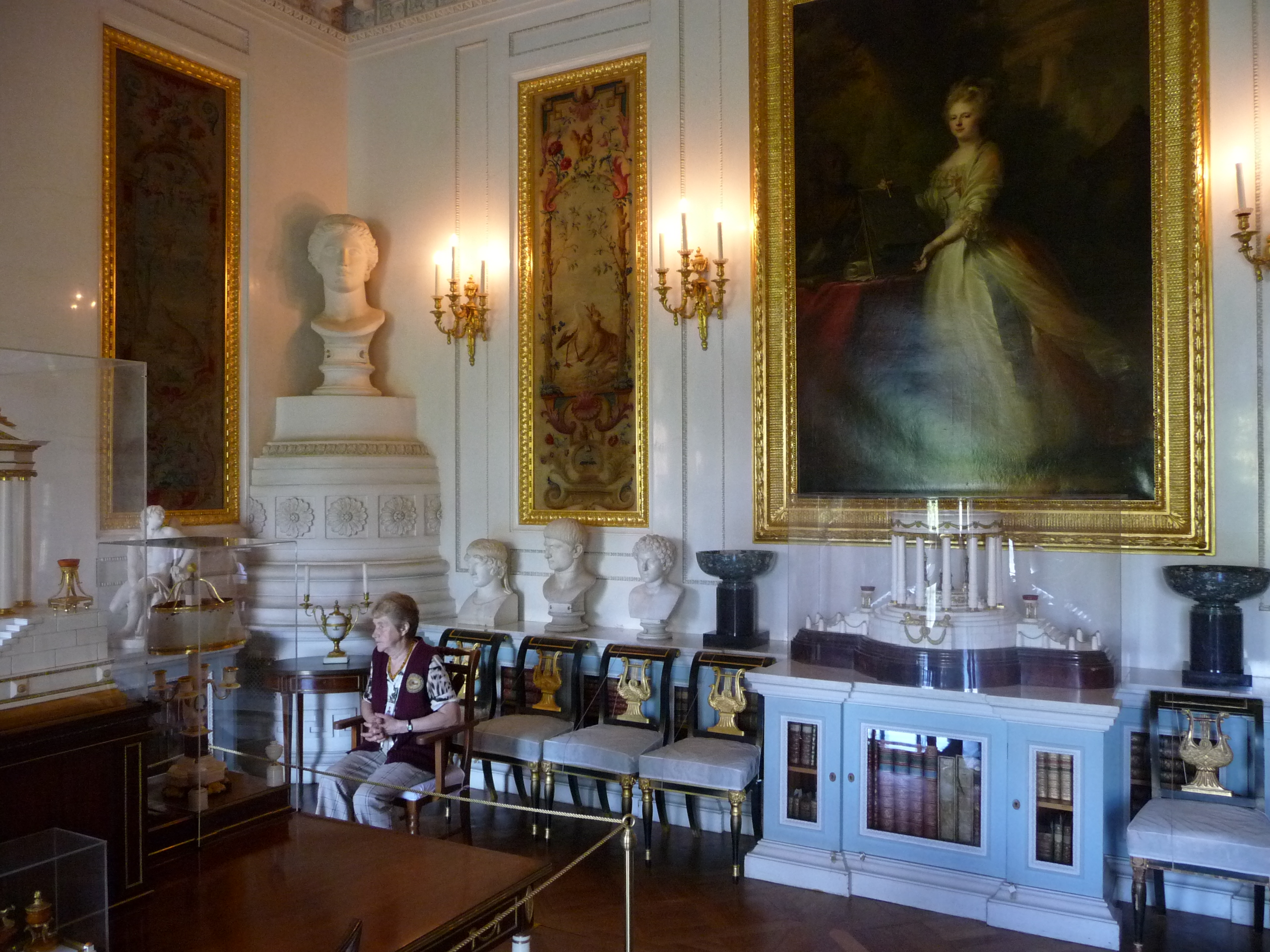 Palace-p1030759.jpg